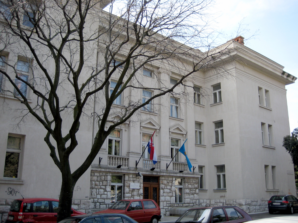 Rektorat Sveučilišta u Rijeci, Trg braće Mažuranića 10